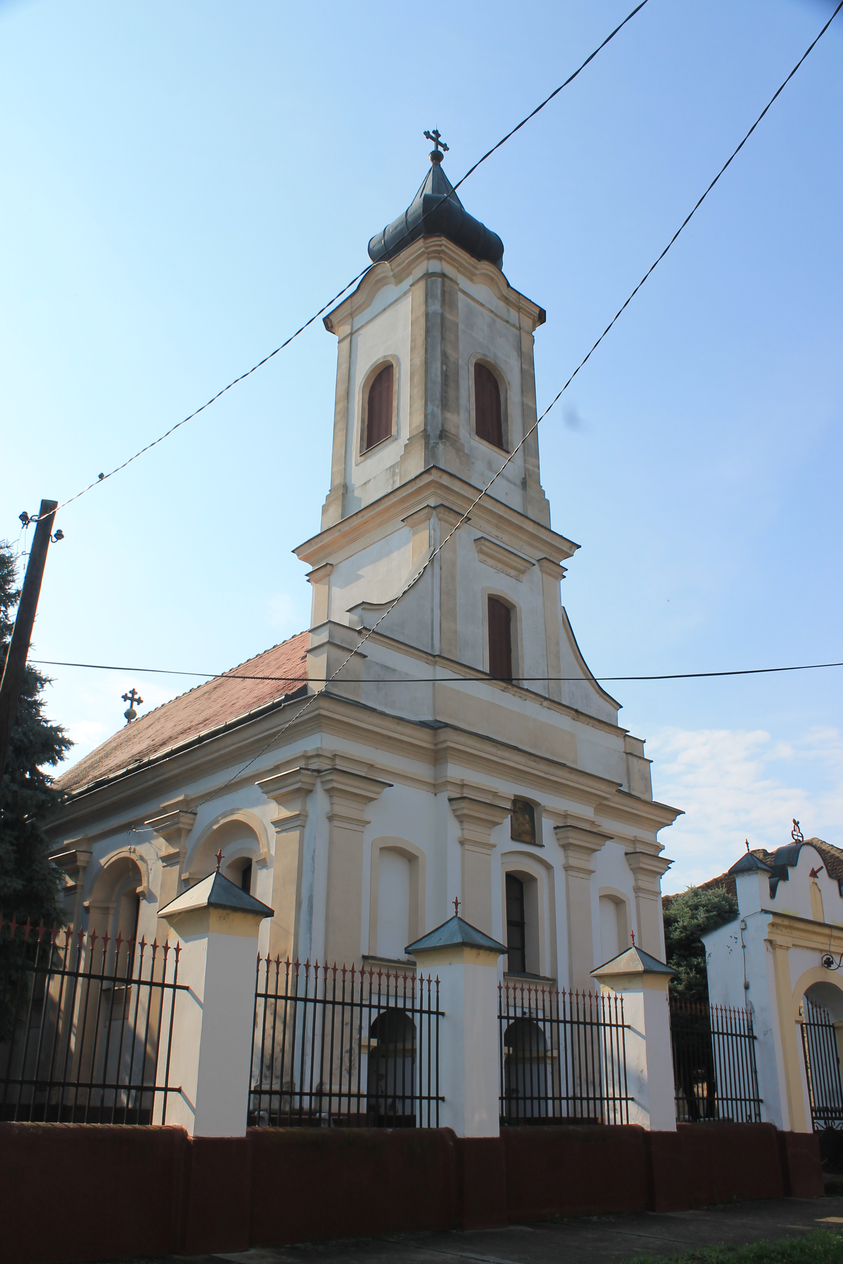 Crkva Sv. Bogorodice (Morović)